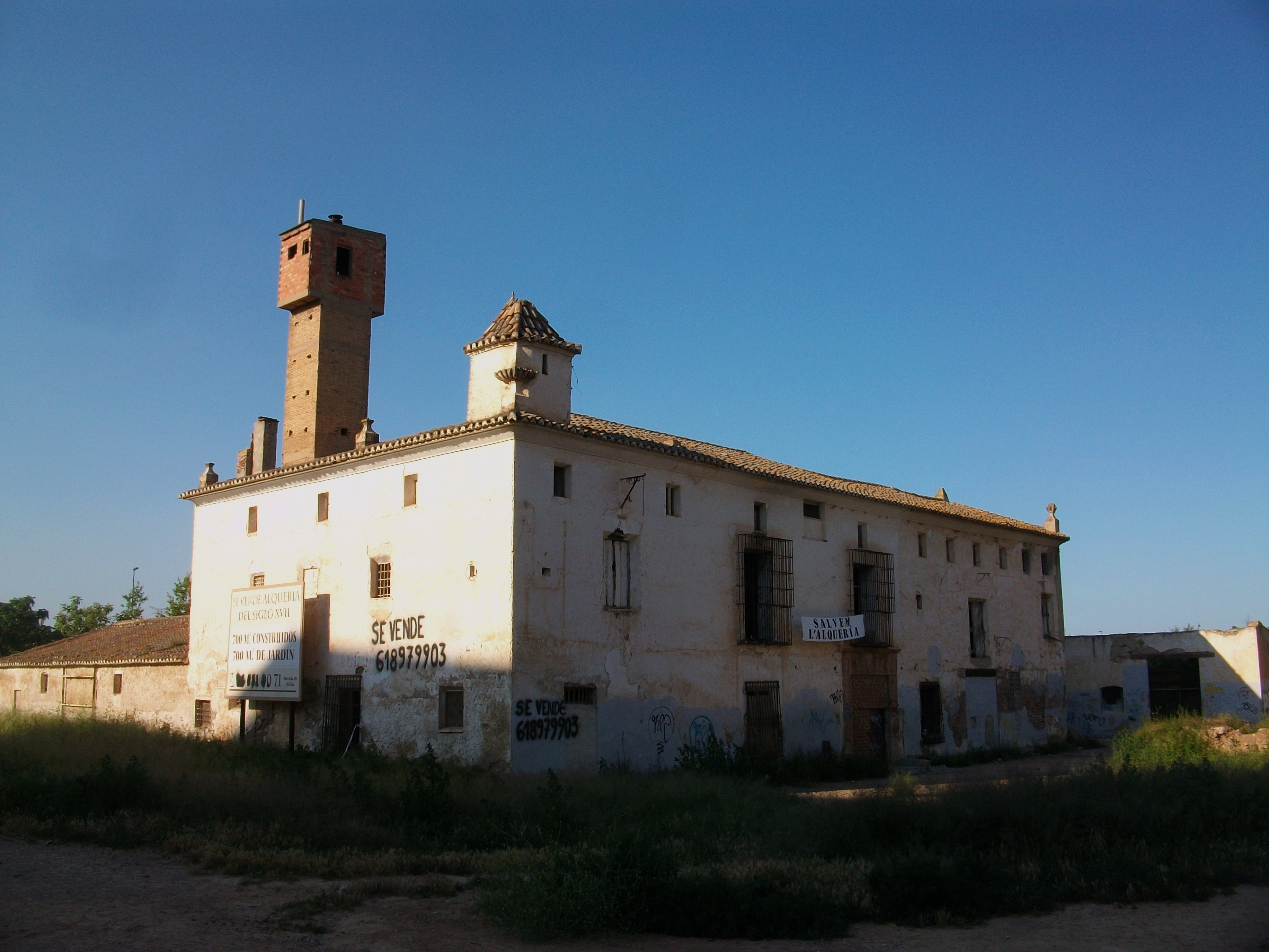 Alqueria de falcó a València.